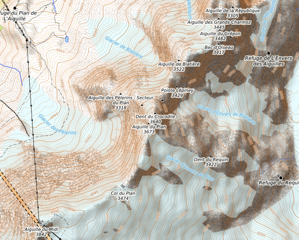 carte réalisée sur umap This map may be incomplete, and may contain errors. Don't rely solely on it for navigation.